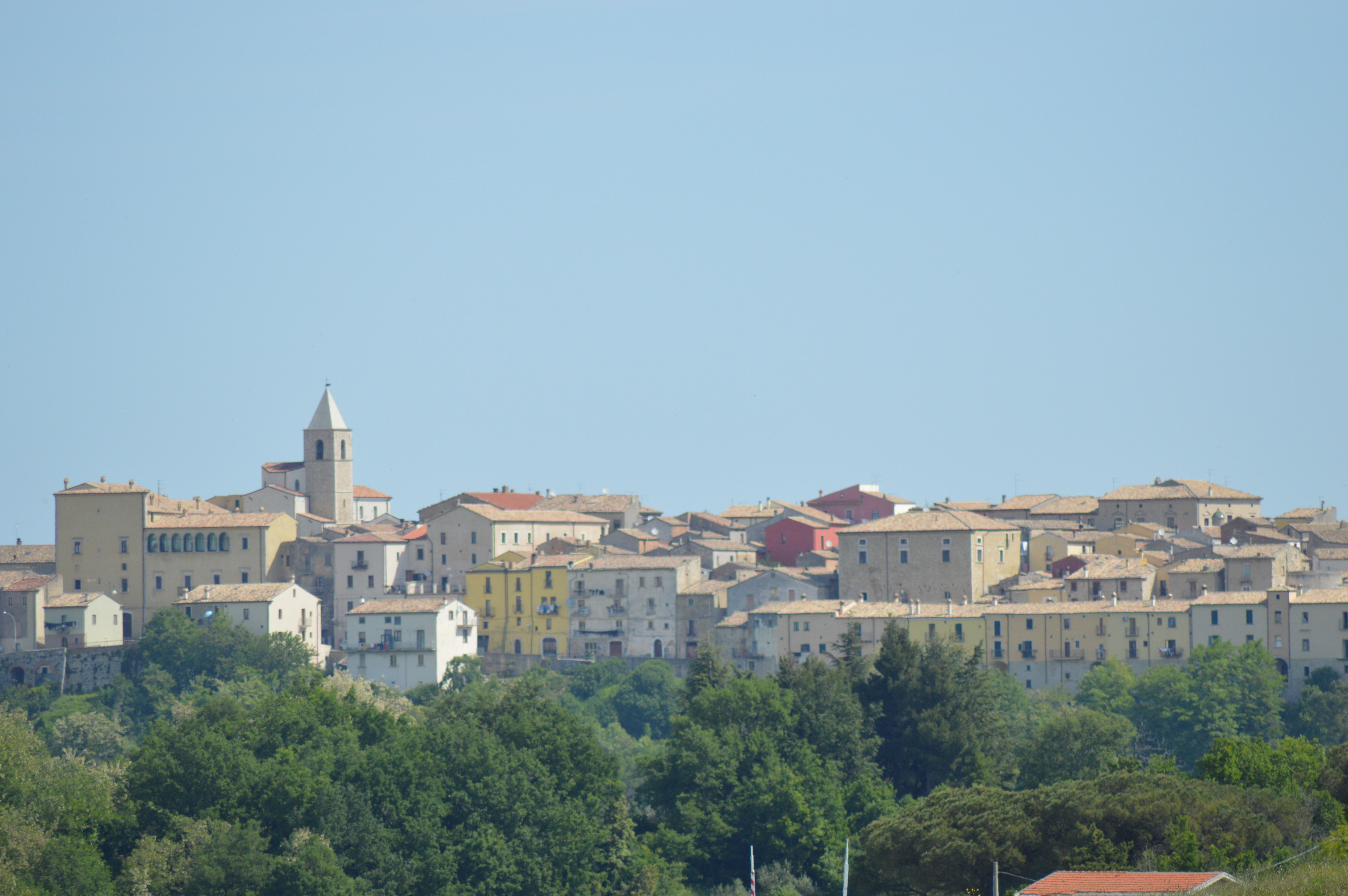 Casacalenda -zona centro storico